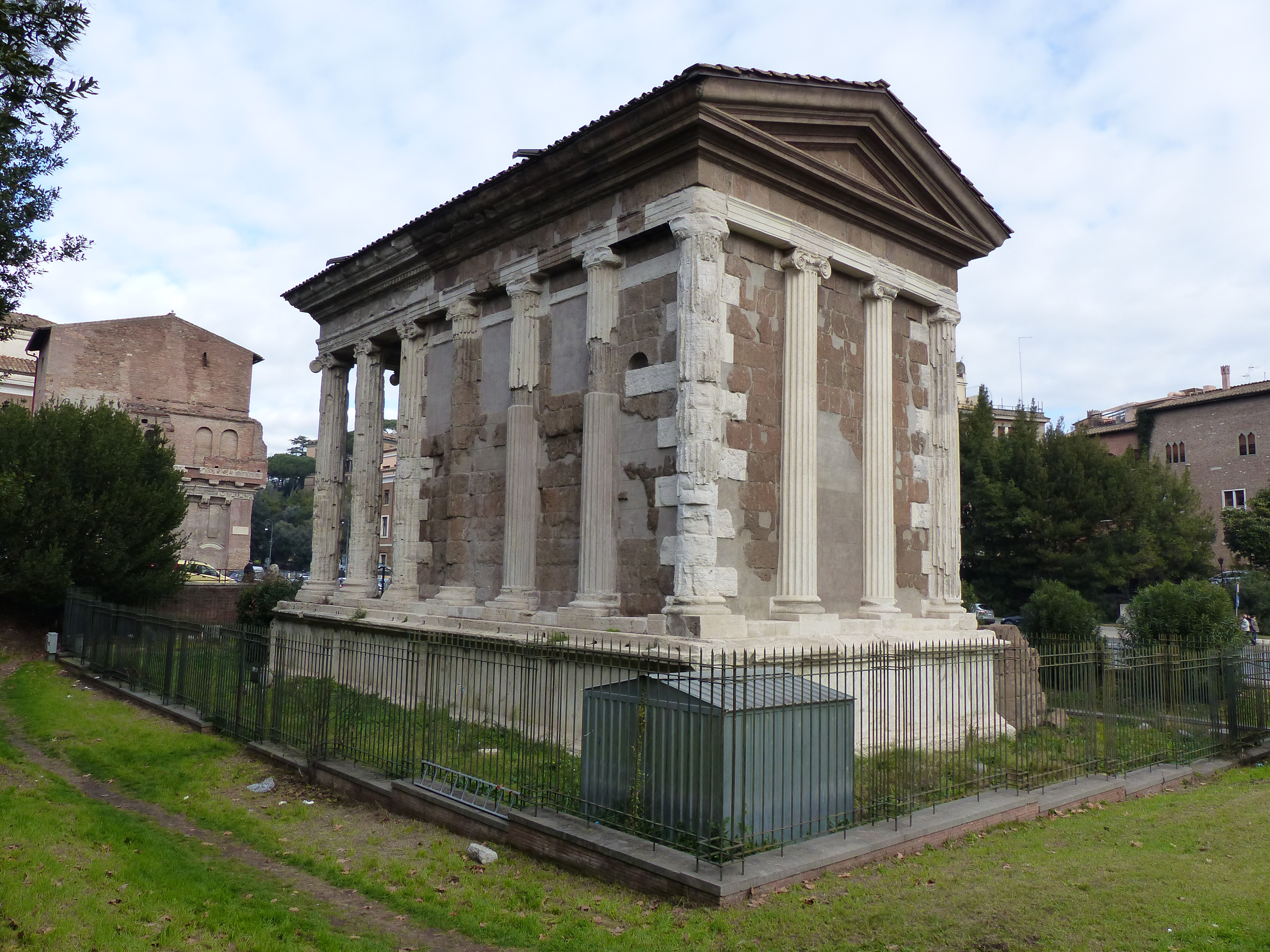 Templo de Portuno, Roma